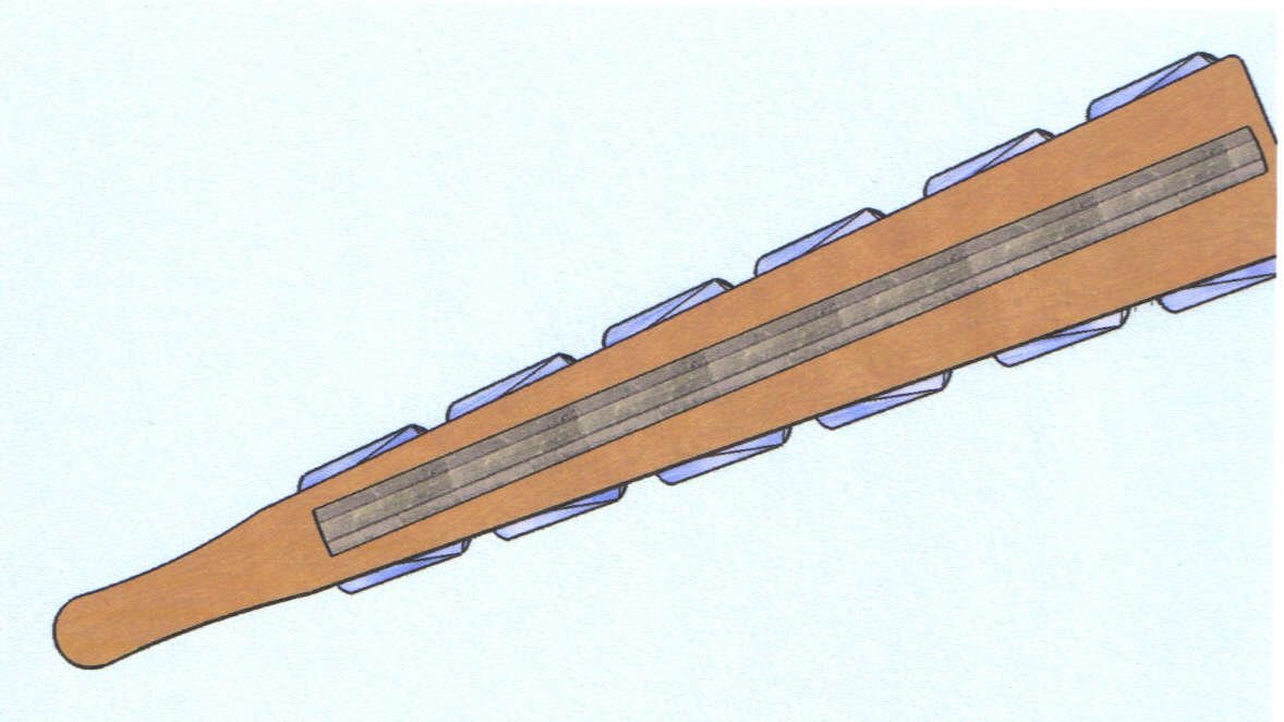 Obsidianschwert1